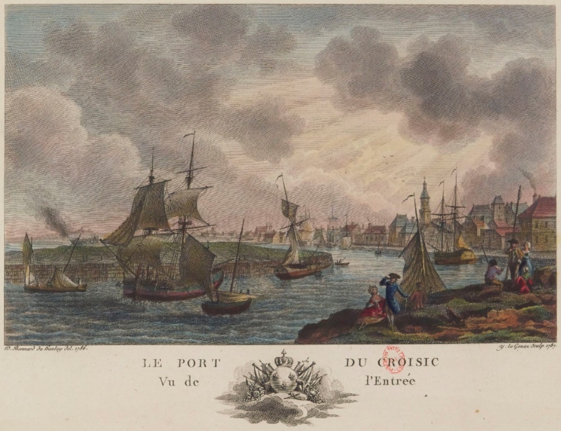 Planche tirée des Nouvelles vues perspectives des ports de France dessinées pour le Roi par M. Ozanne. Gravées par Y. Le Gouaz en 1776.